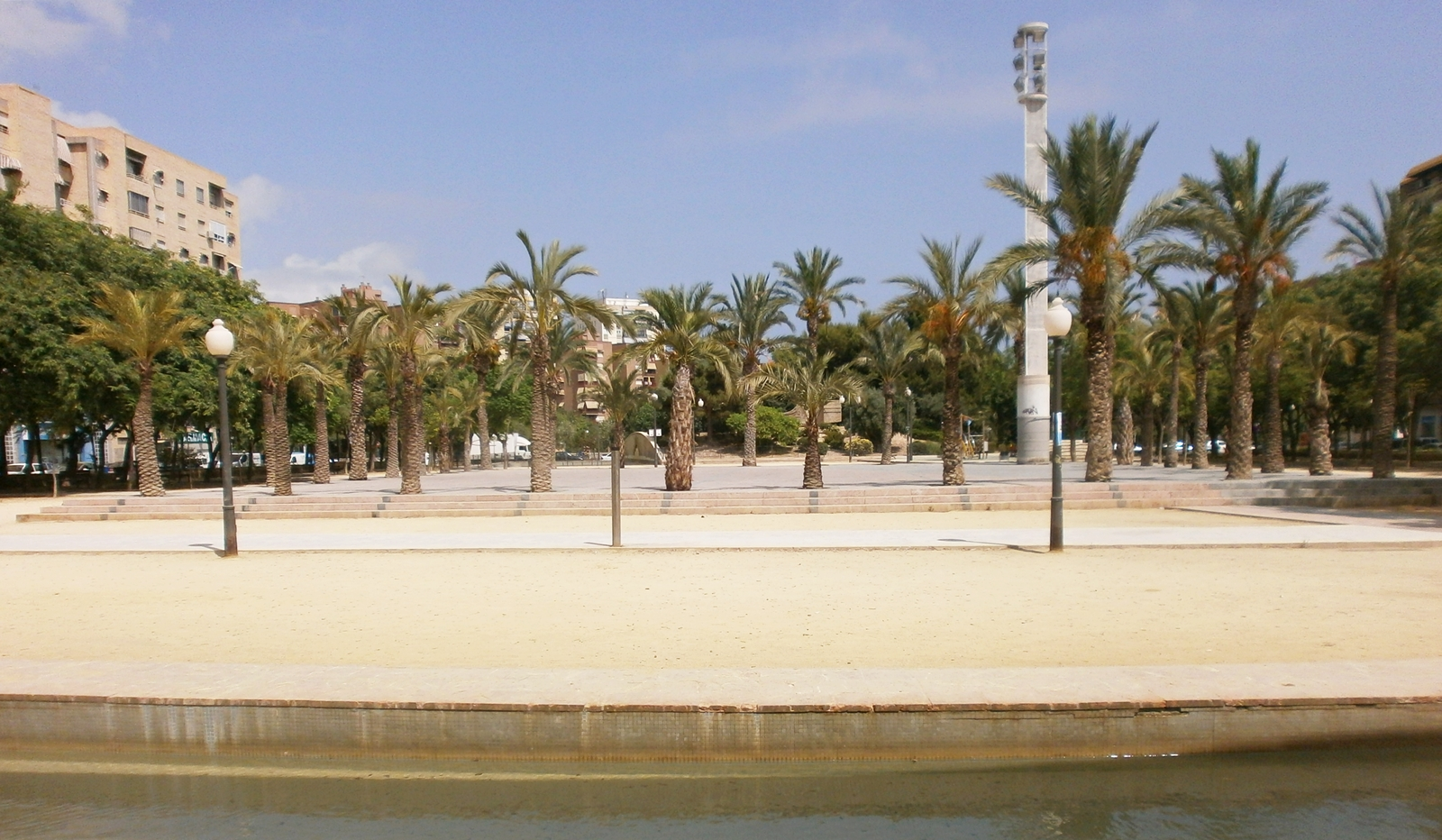 Vista de la Plaza de La Viña en Alicante, España.